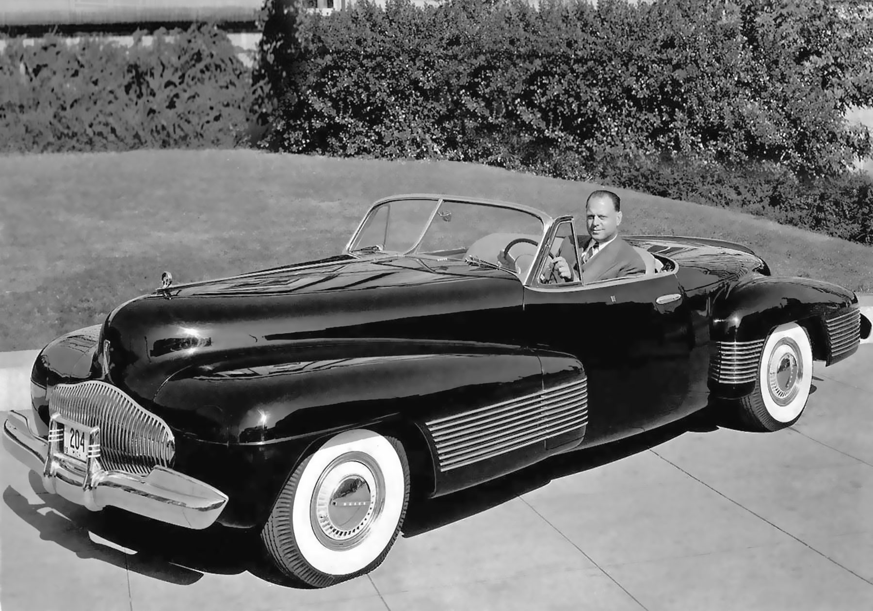 video link inside